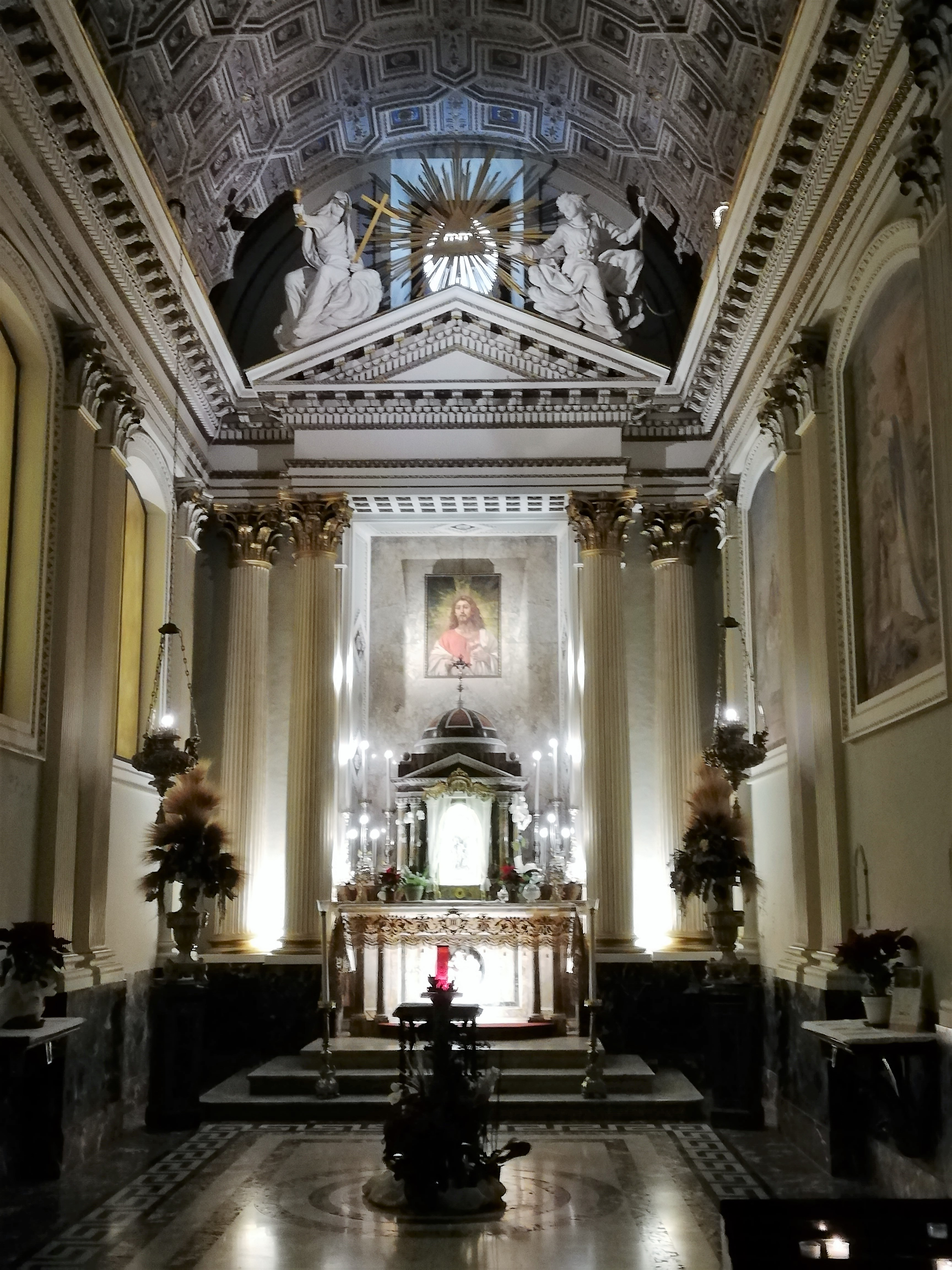 Cappella del Santissimo Sacramento.